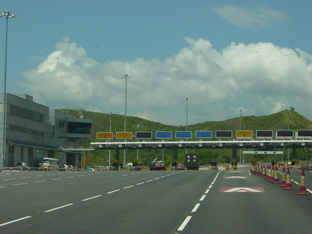 青嶼幹線收費廣場